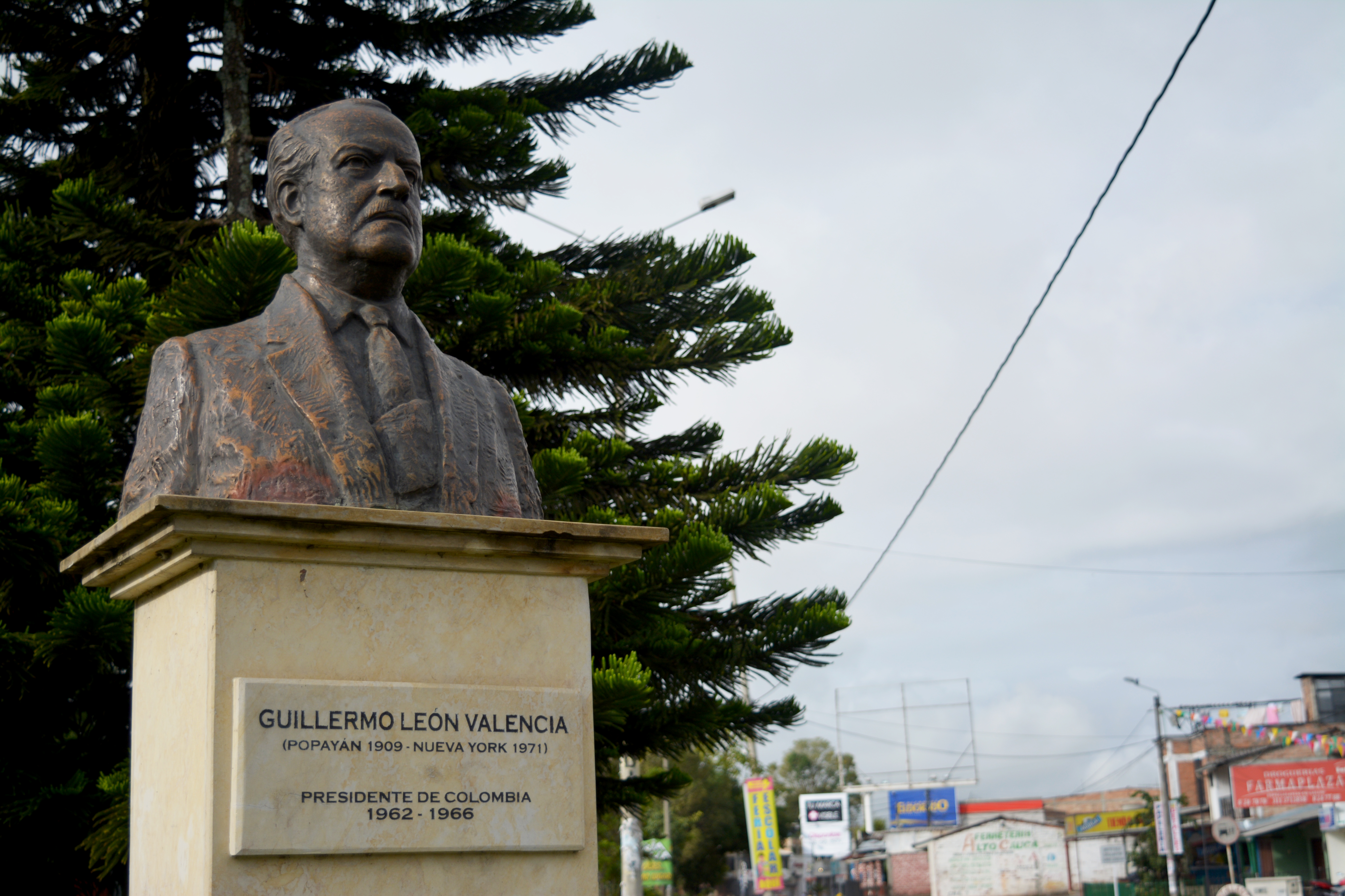 Guillermo León Valencia Esta fotografía fue tomada en el municipio colombiano con código 19001.